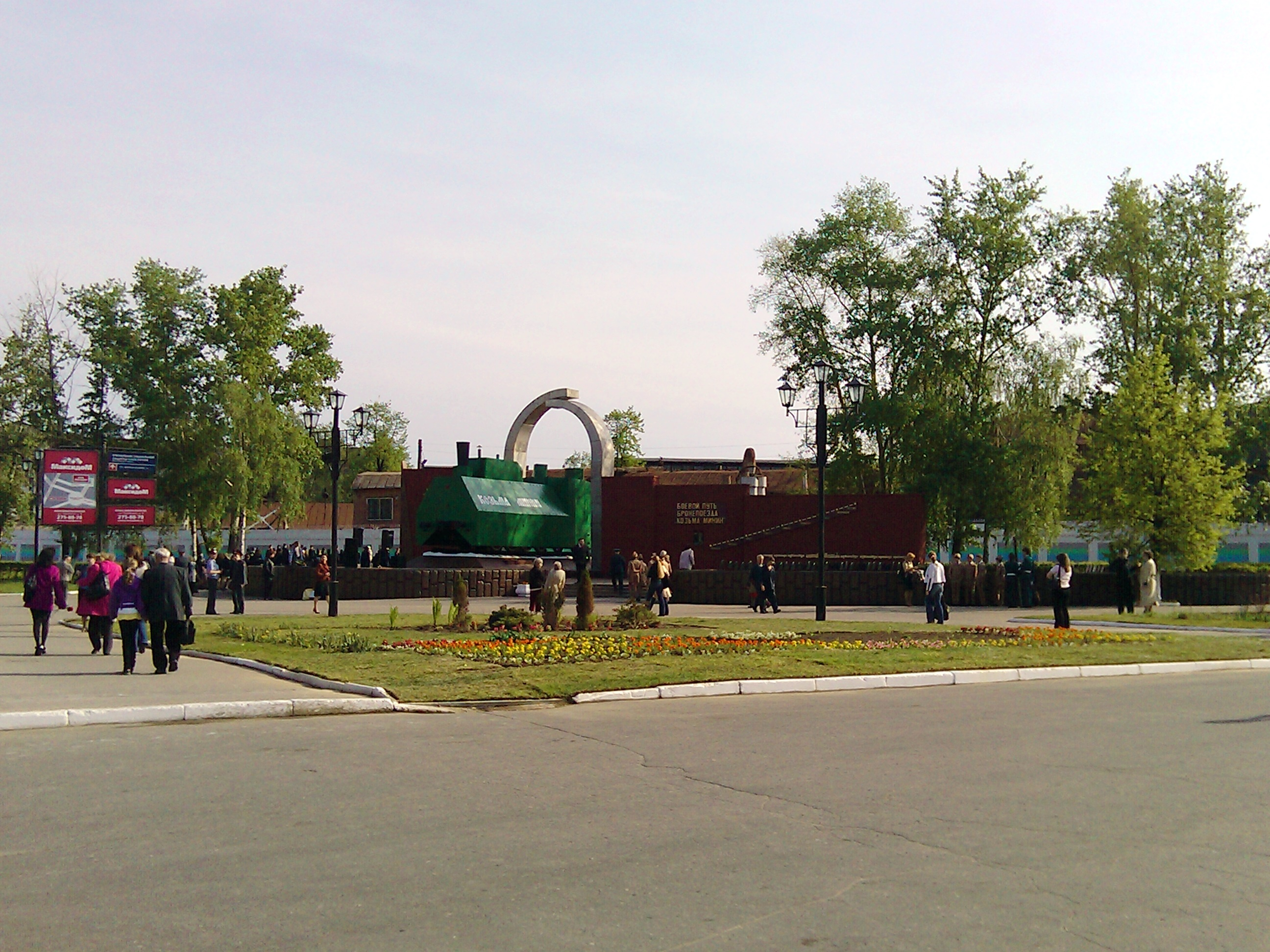 Бронированный паровоз бронепоезда Козьма Минин